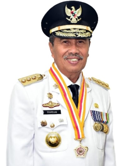 Gubernur Riau Syamsuar